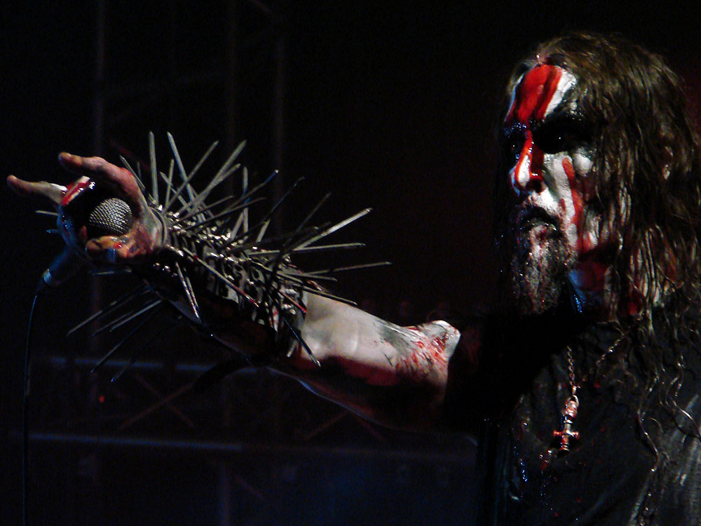 God Seed au Hellfest 2009: Gaahl.